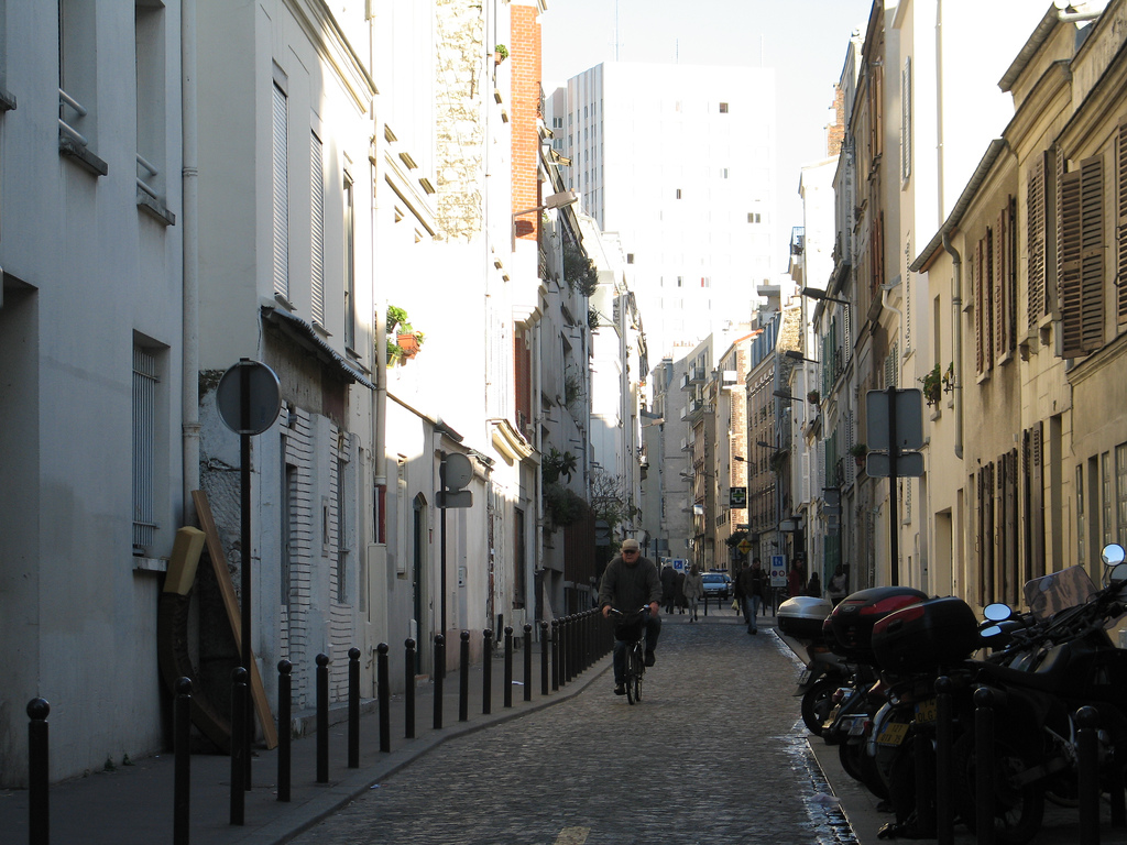 une petite rue de Belleville, Paris